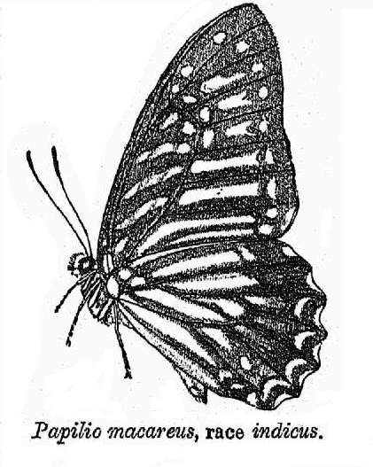 Papilio macareus indicus = Graphium macareus indicus (Rothschild, 1895)